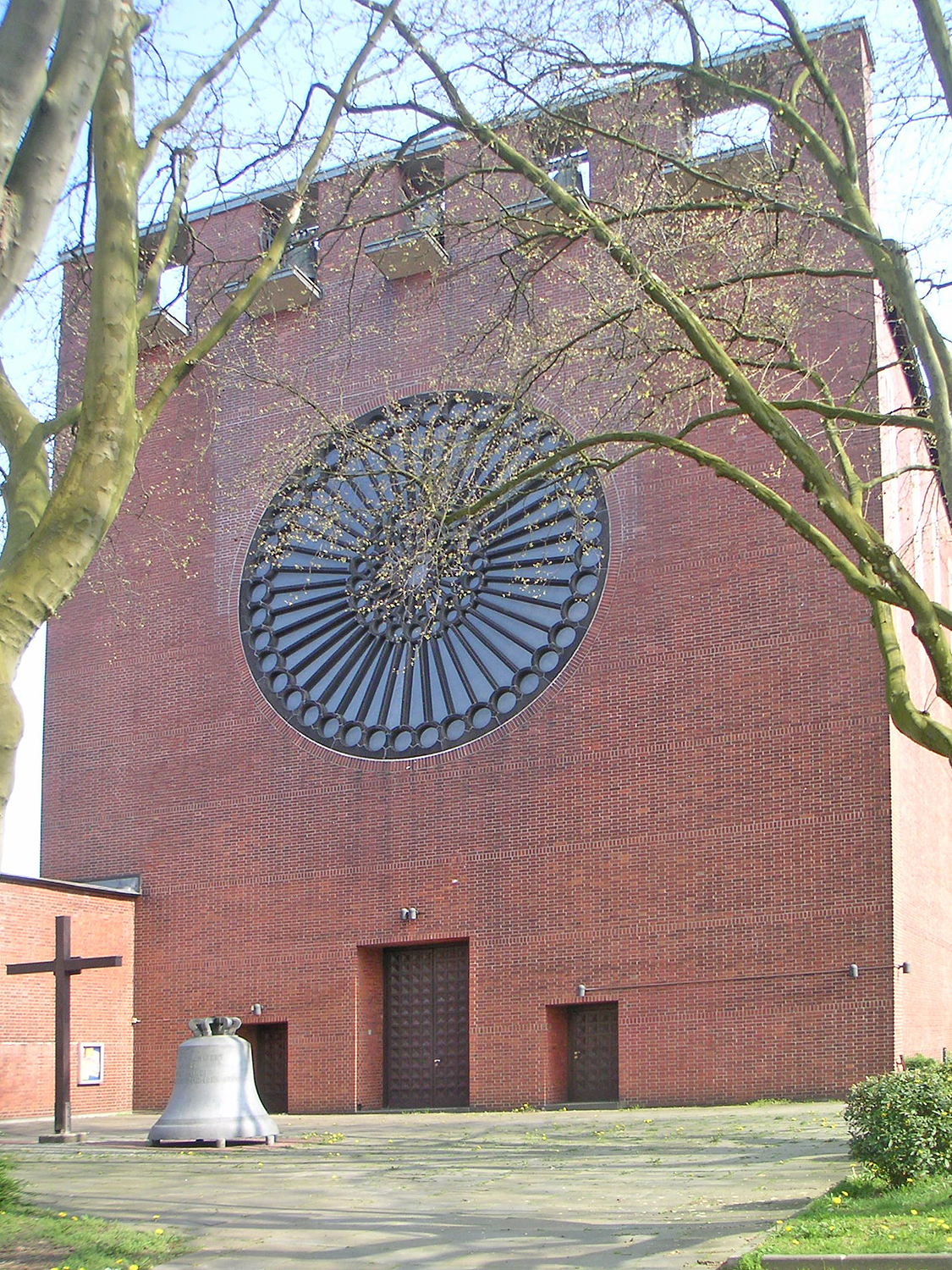 St. Engelbert, Essen-Südviertel. Architekt: Dominikus Böhm, Wiederaufbau durch Gottfried Böhm